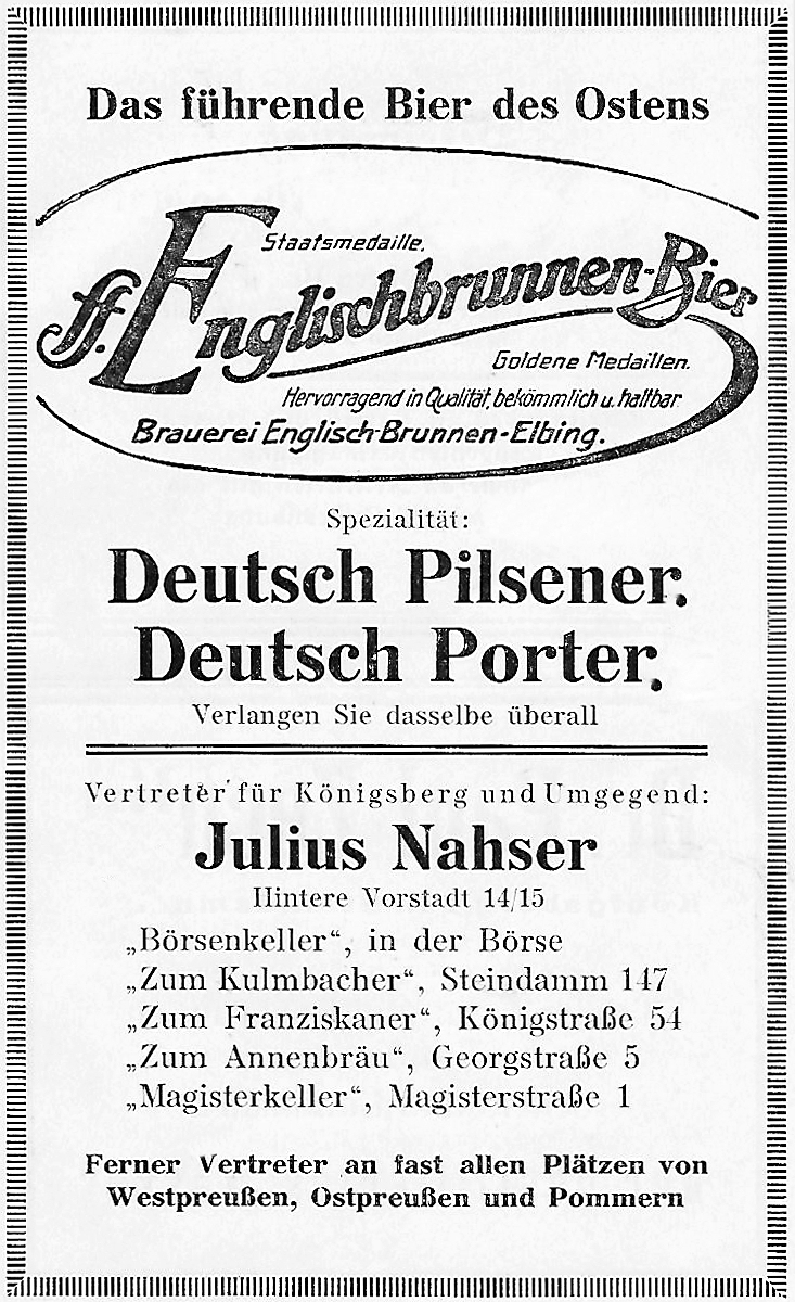 Werbung der Brauerei Englischbrunnen in Königsberg